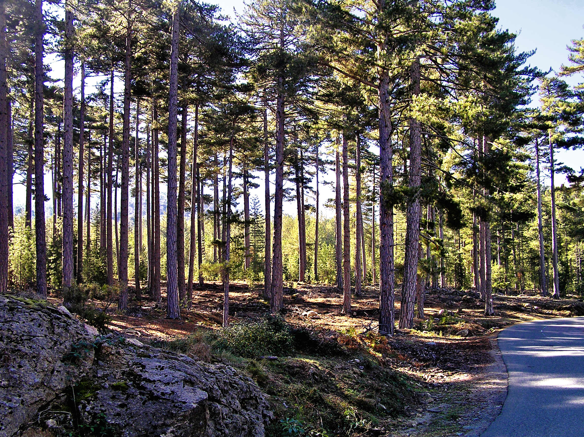 Albertacce (Corsica) - Forêt de Pinus nigra, Valdu Niellu